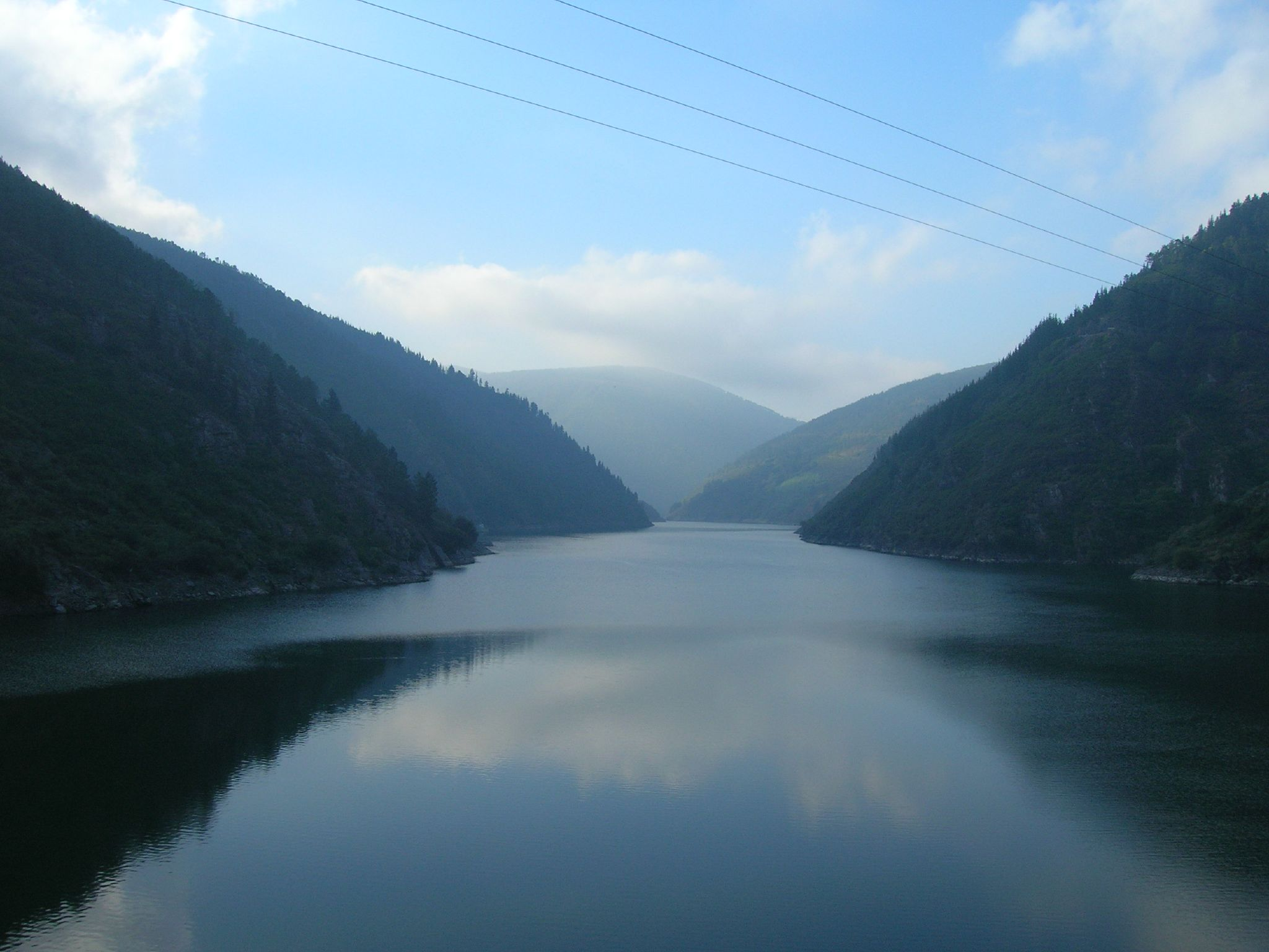 Al llegar hasta el embalse la niebla ya se había disipado y nos permitió contemplar el paisaje. Vuela hasta esta localización. Necesitas el programa Google Earth.